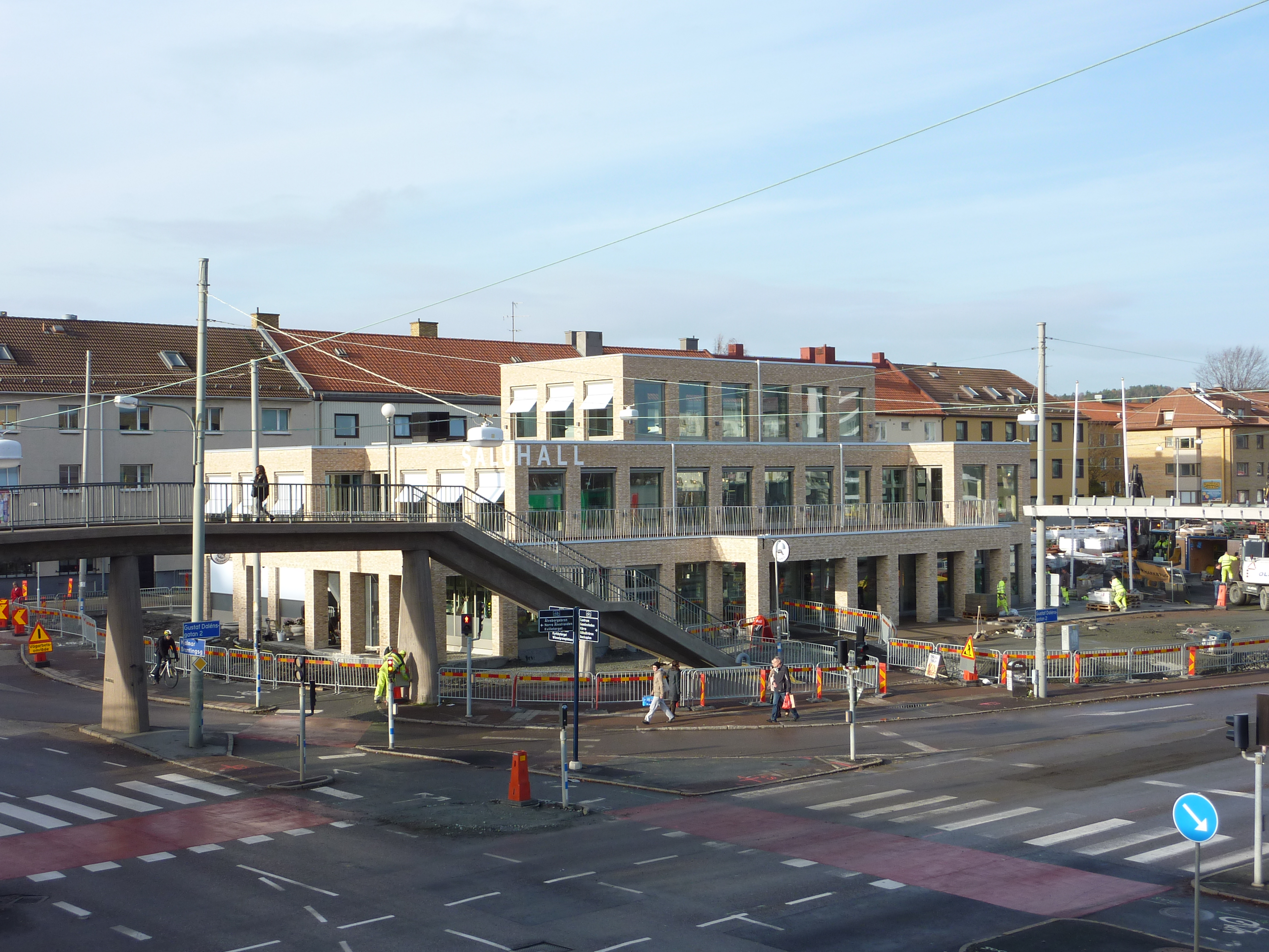 Kville saluhall, Vågmästareplatsen